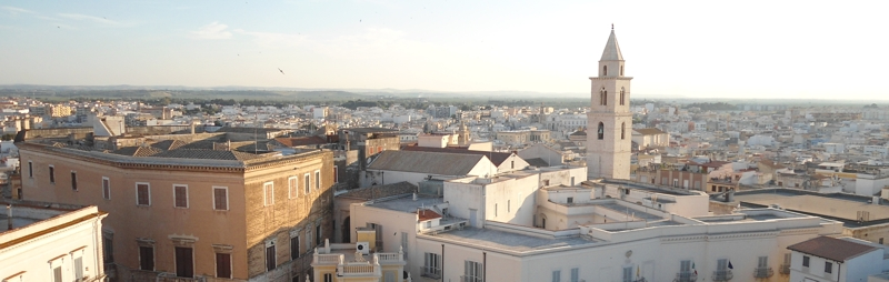 Panorama della città di Andria